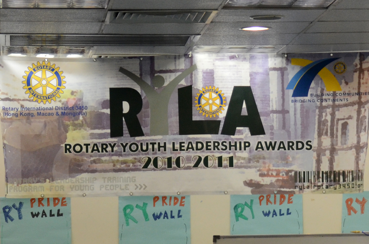 國際扶輪3450地區 扶輪青年領袖獎勵計劃2010-2011